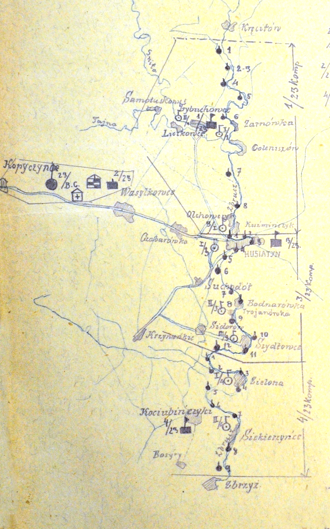 Szkic rozmieszczenia 23 batalionu celnego